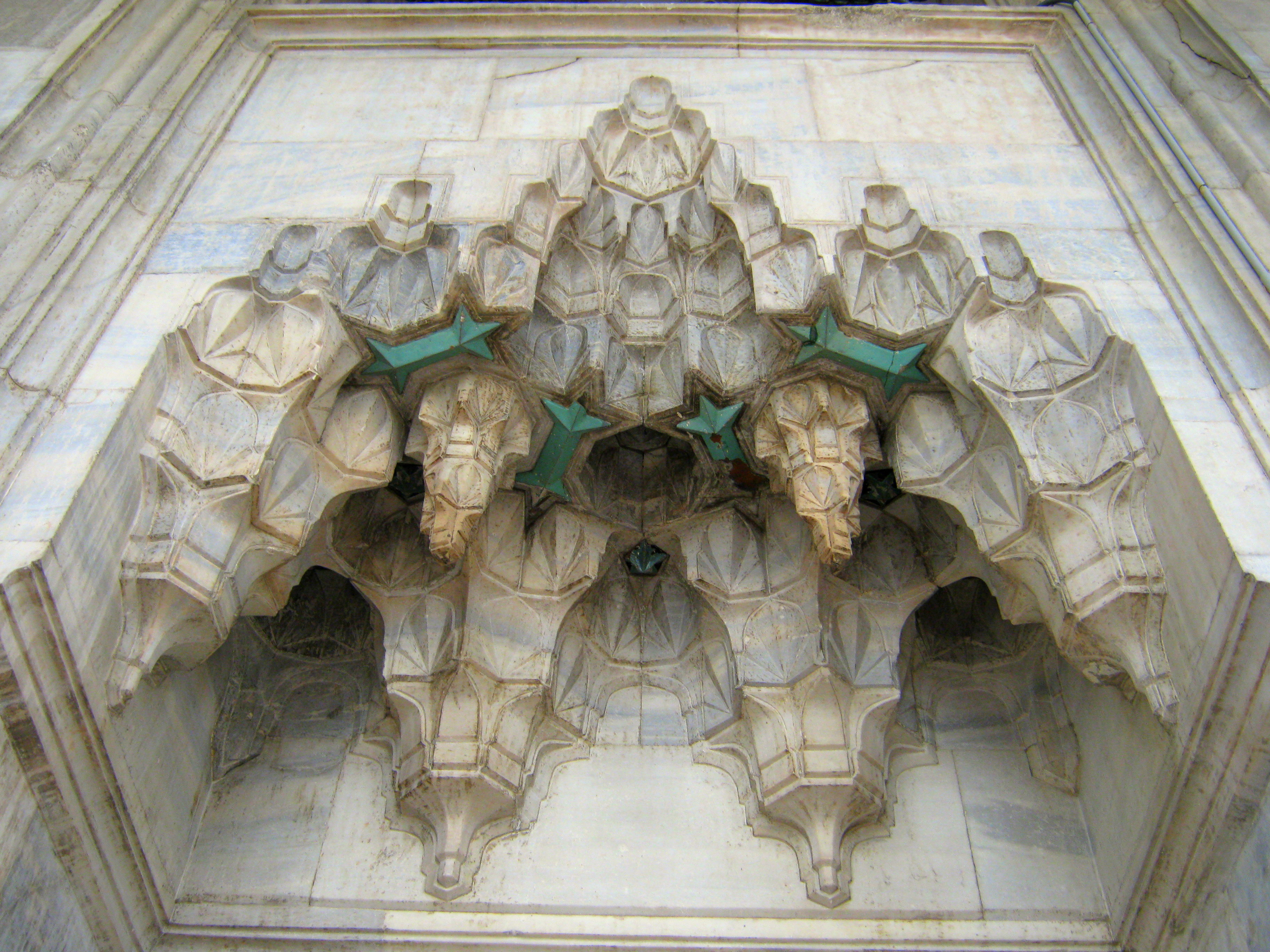 YILDIRIM,BEYAZIT,CAMİİ,BURSA,TAŞ,İŞCİLİĞİ